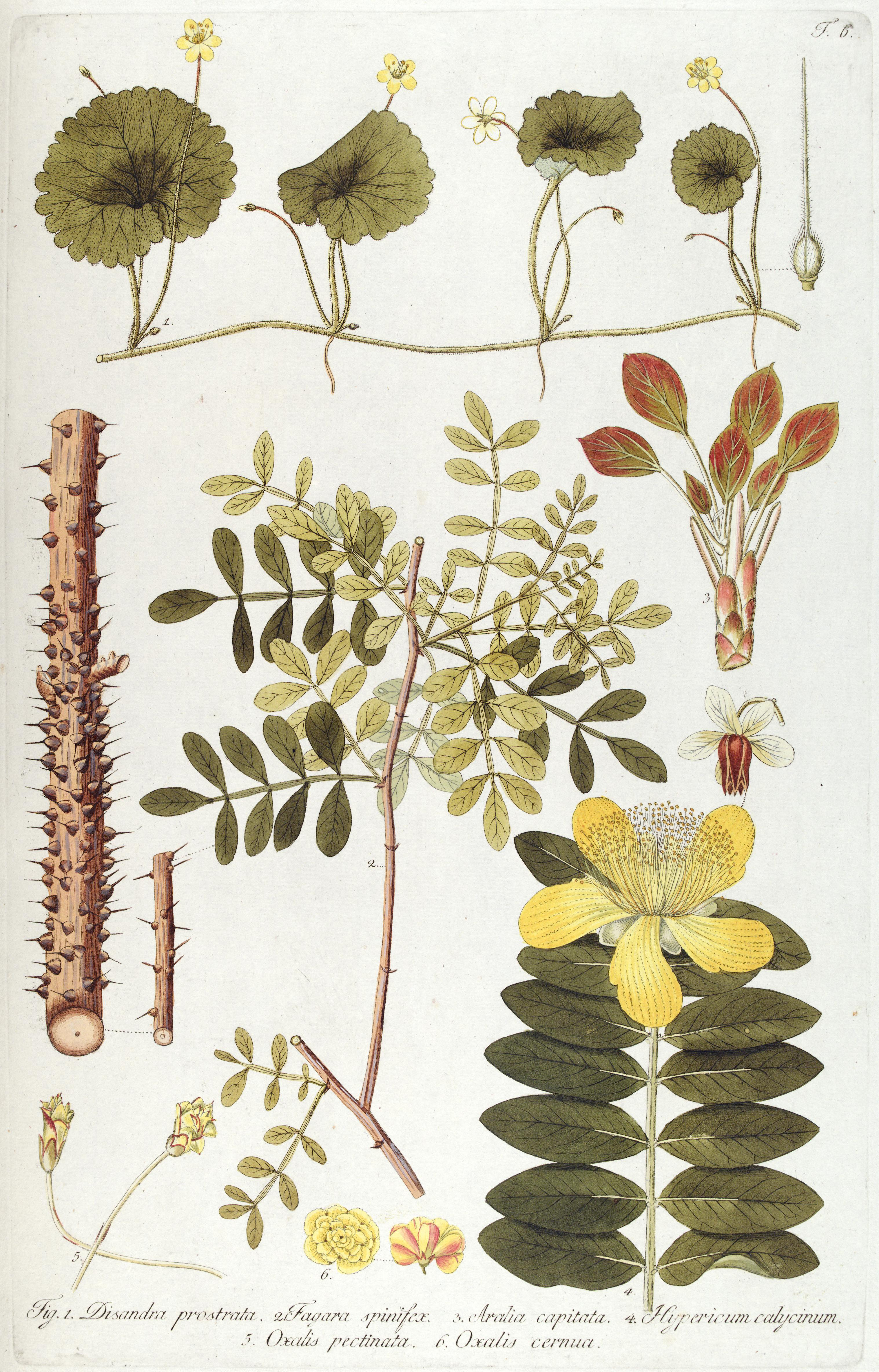 Fragmenta botanica, figuris coloratis illustrata :ab anno 1800 ad annum 1809 per sex fasciculos edita /opera et sumptibus Nicolai Josephi Jacquin.